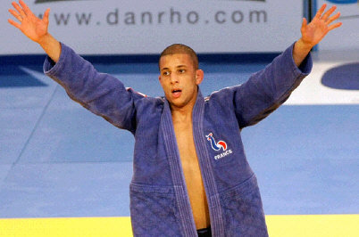 lord des championnats deurope de vienne